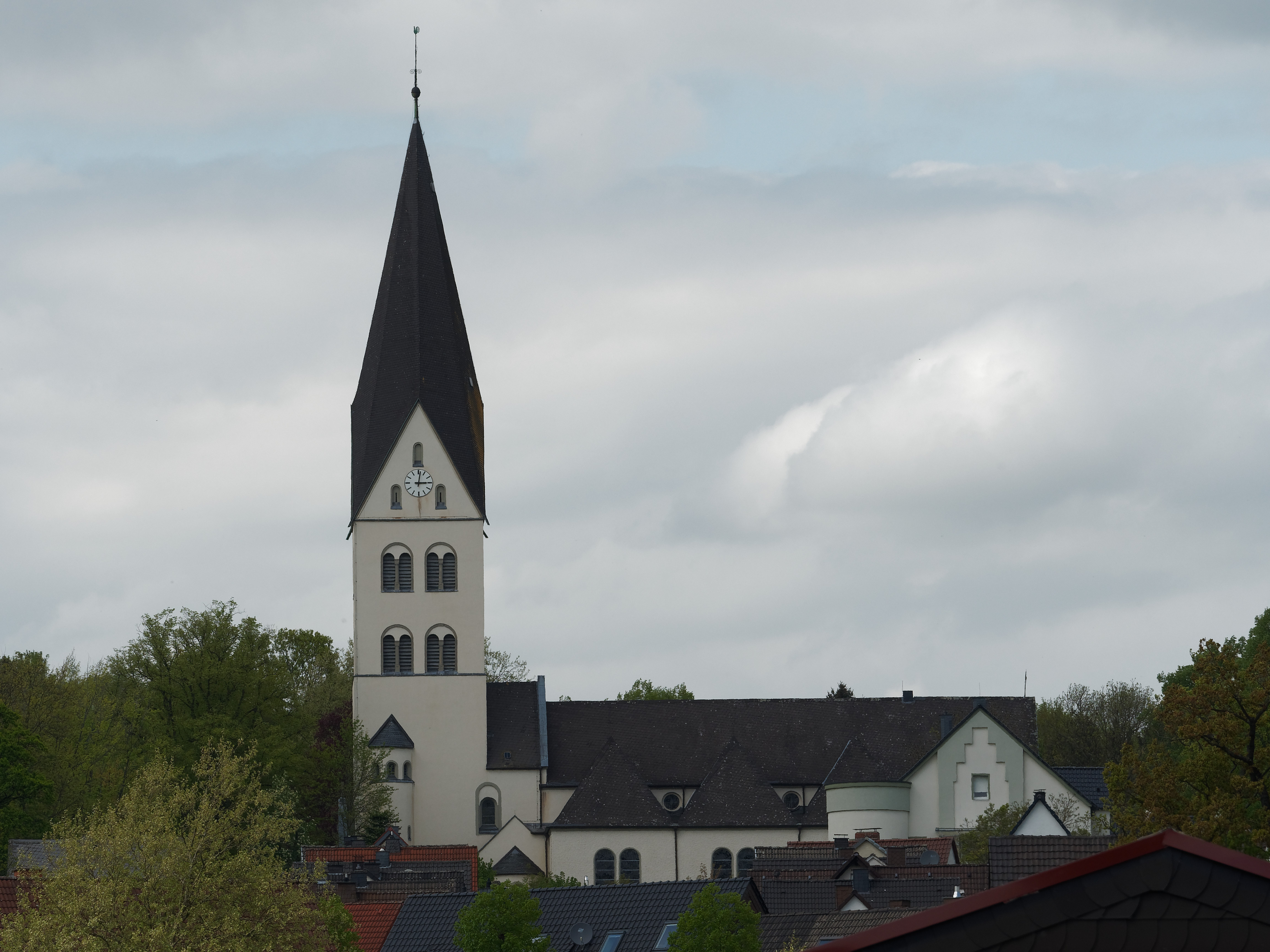 Die katholische Kirche St. Antonius von Padua, Ansicht von Süden